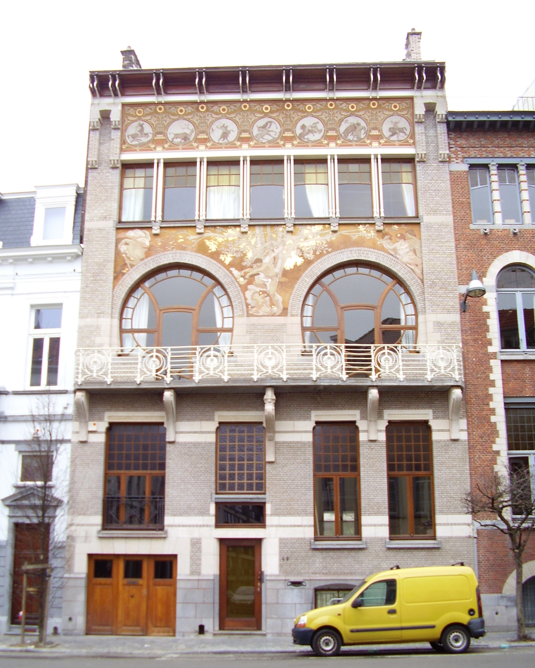 Hôtel Ciamberlani (1897 - Architecte: Paul Hankar). Rue Defaqz, commune d’Ixelles, Bruxelles/ après rénovation fin 2006